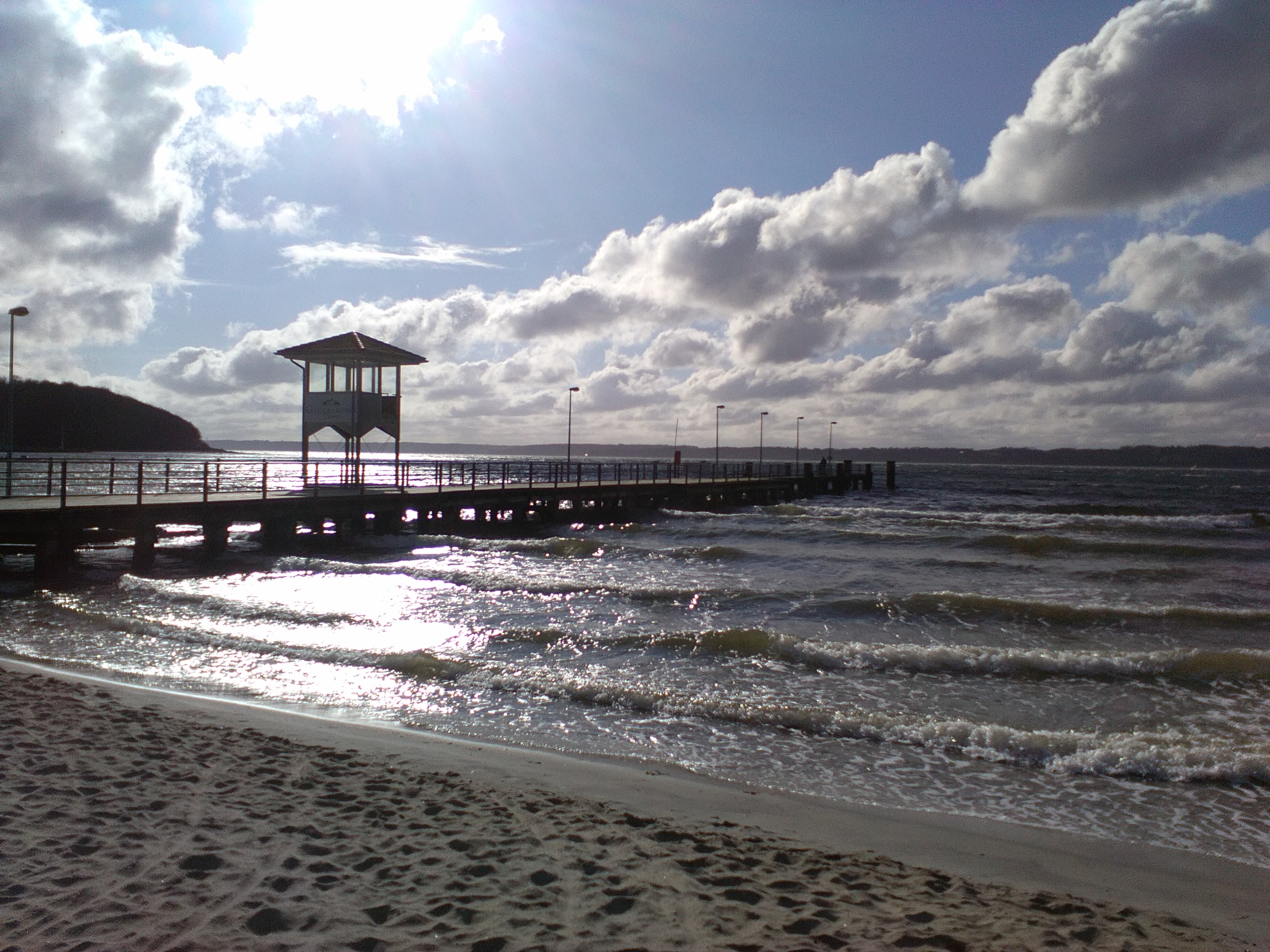 Seebrücke Glücksburg mit DLRG-Wachturm, 2016